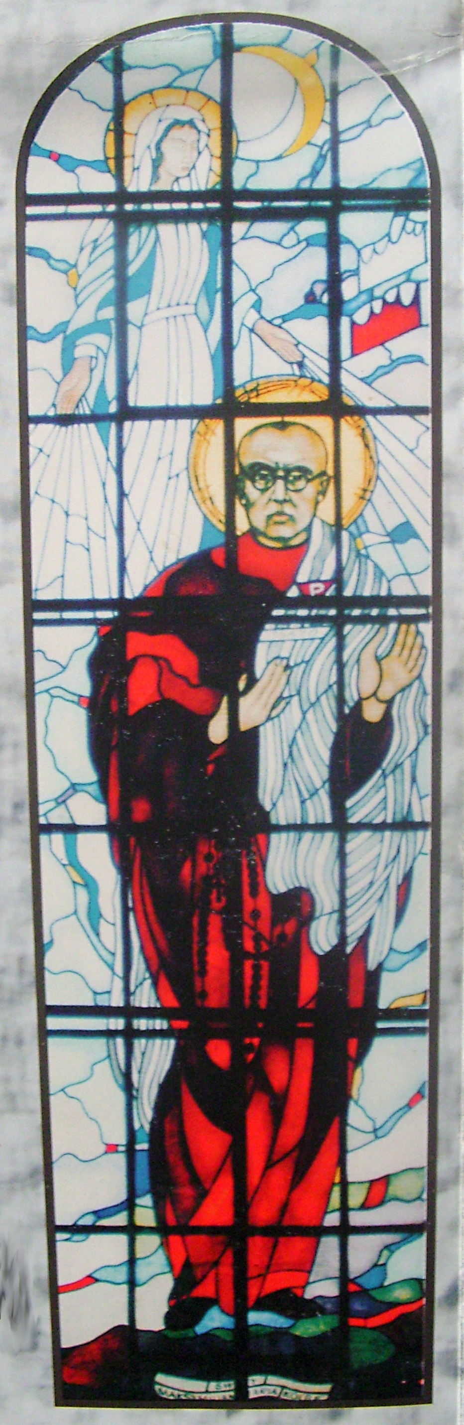 św. Maksymilian Maria Kolbe - - witraż w kościele Imienia Maryi w Bączalu Dolnym (diecezja rzeszowska)